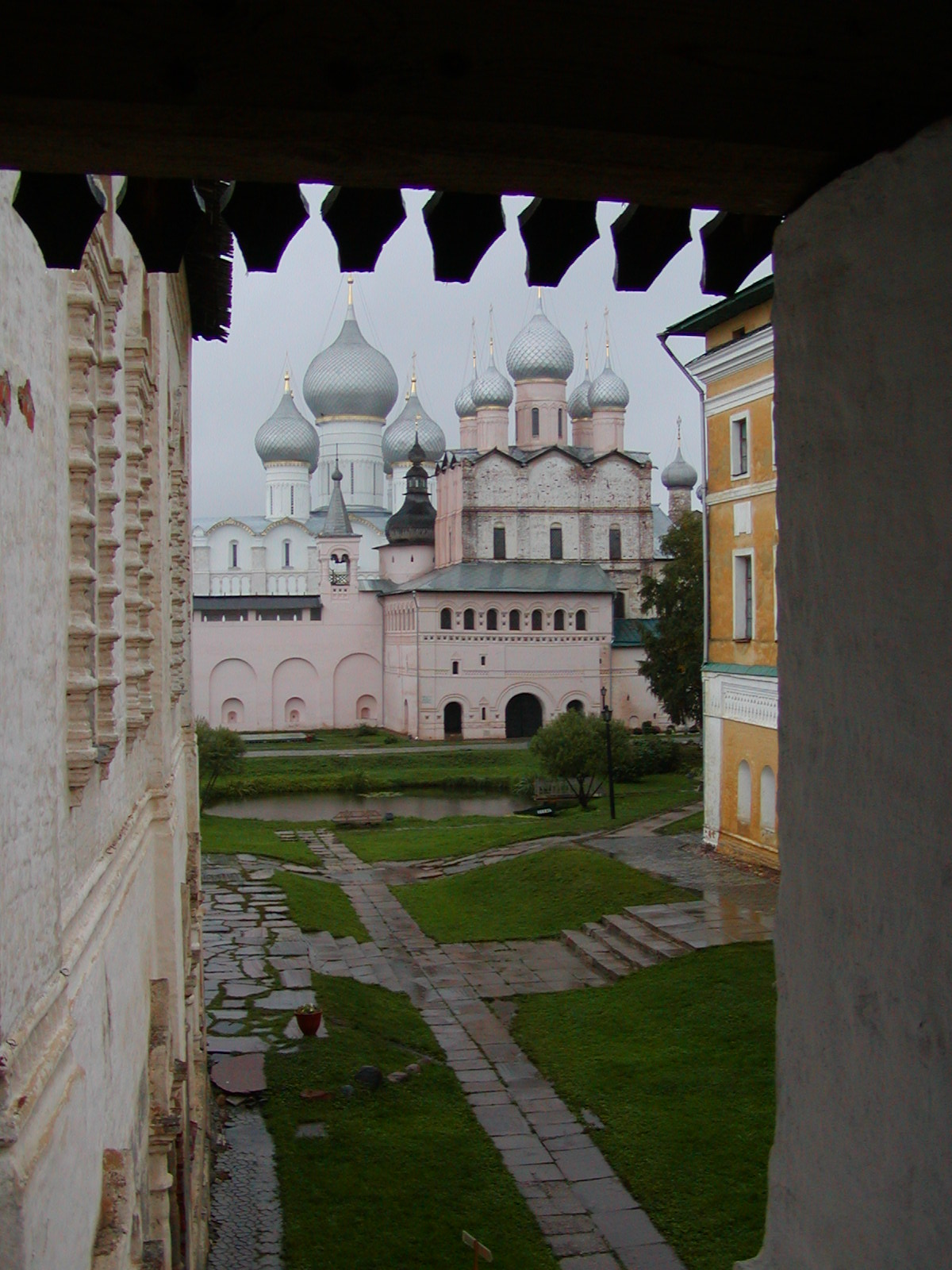 Государственный музей-заповедник "Ростовский кремль"